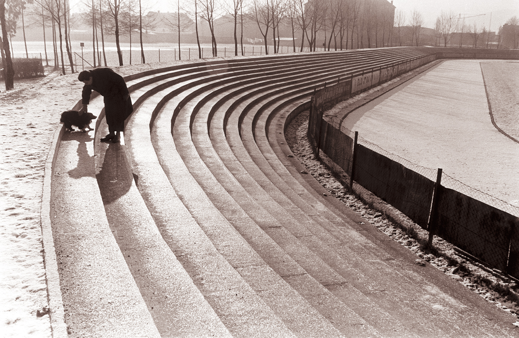 Branikov stadion